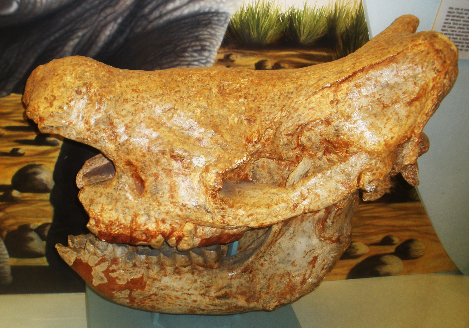 Fossil of Ceratotherium neumayri, an extinct mammal - Took the picture at Museo di Paleontologia di Firenze